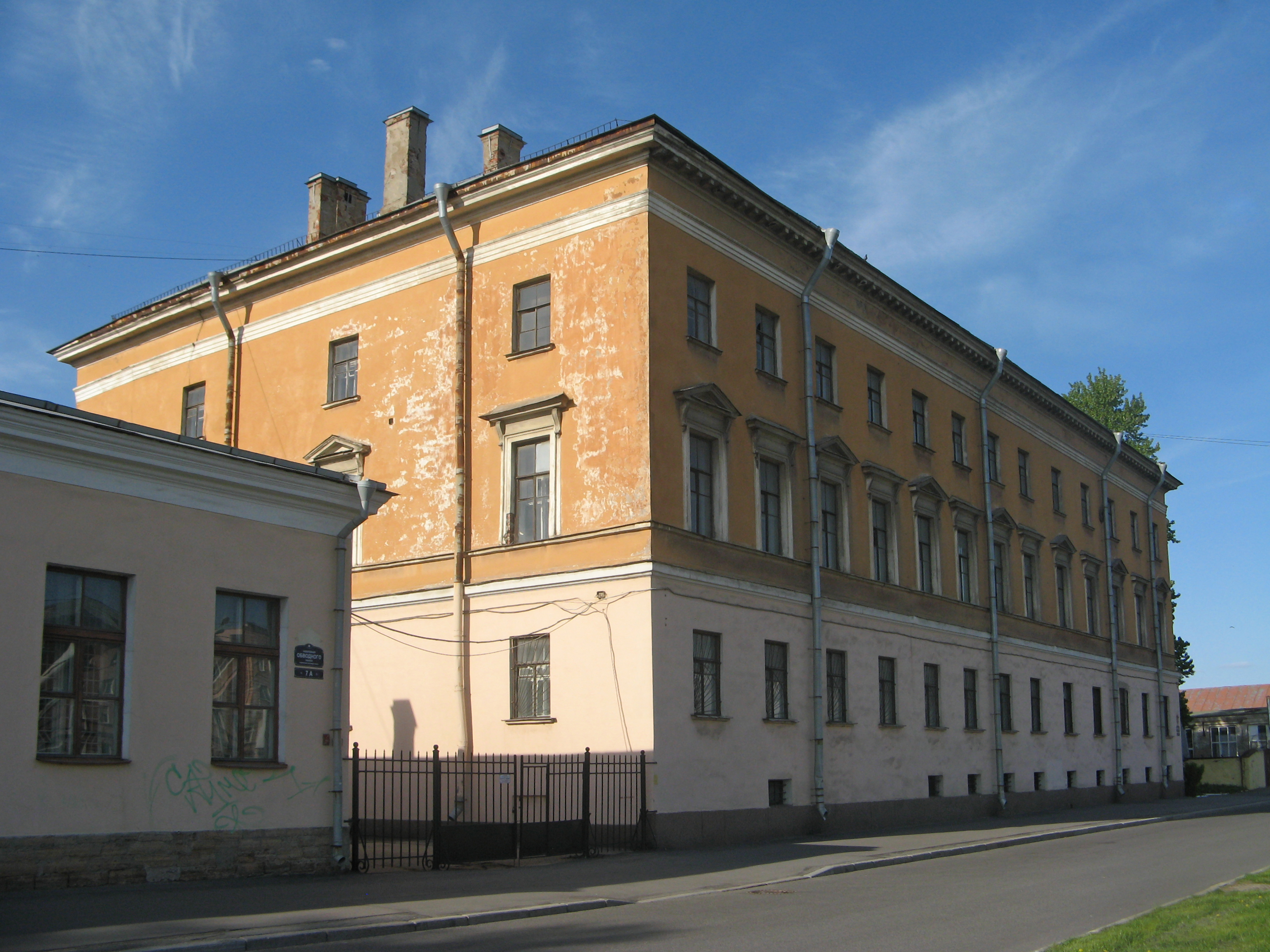 Духовная академия. Главное здание: набережная Обводного канала, 7, Центральный район, Санкт-Петербург